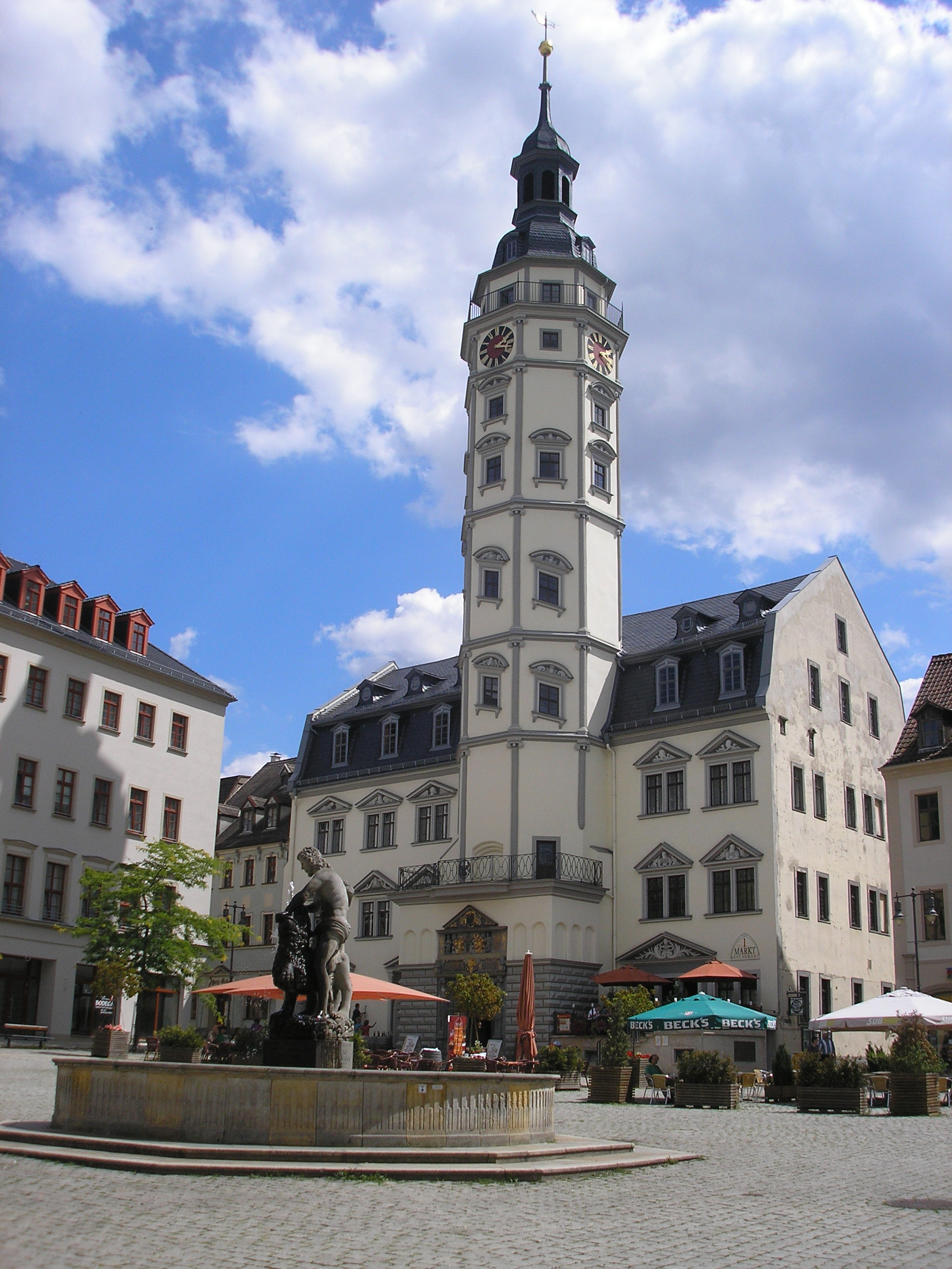 Das Rathaus in Gera (Thüringen).